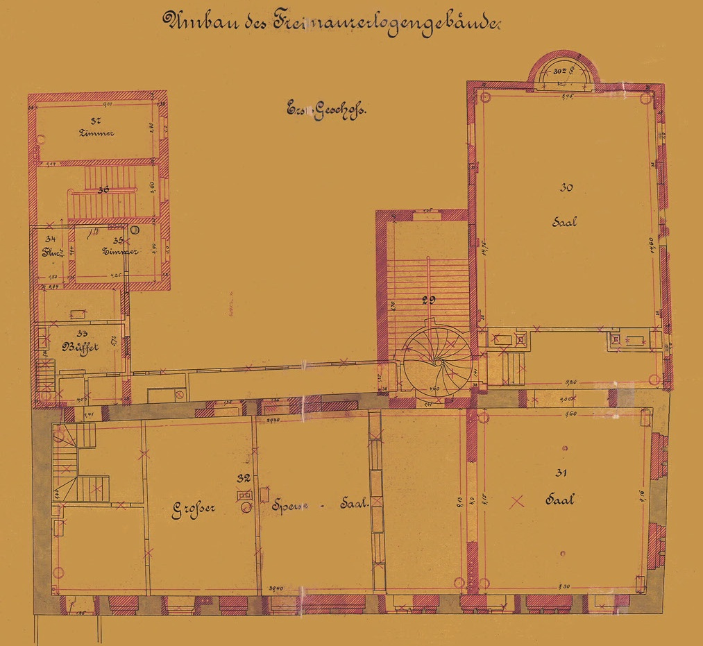 Erfurt, Tuniergasse 17, 1. OG 1881